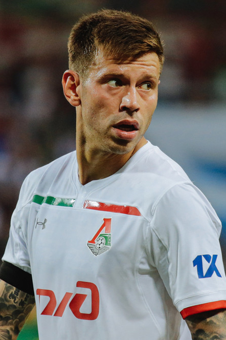 Дебютный гол Смолова принес победу «Локомотиву» над «Анжи»